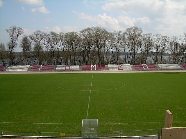 Modernizacja stadionu miejskiego w Łomży